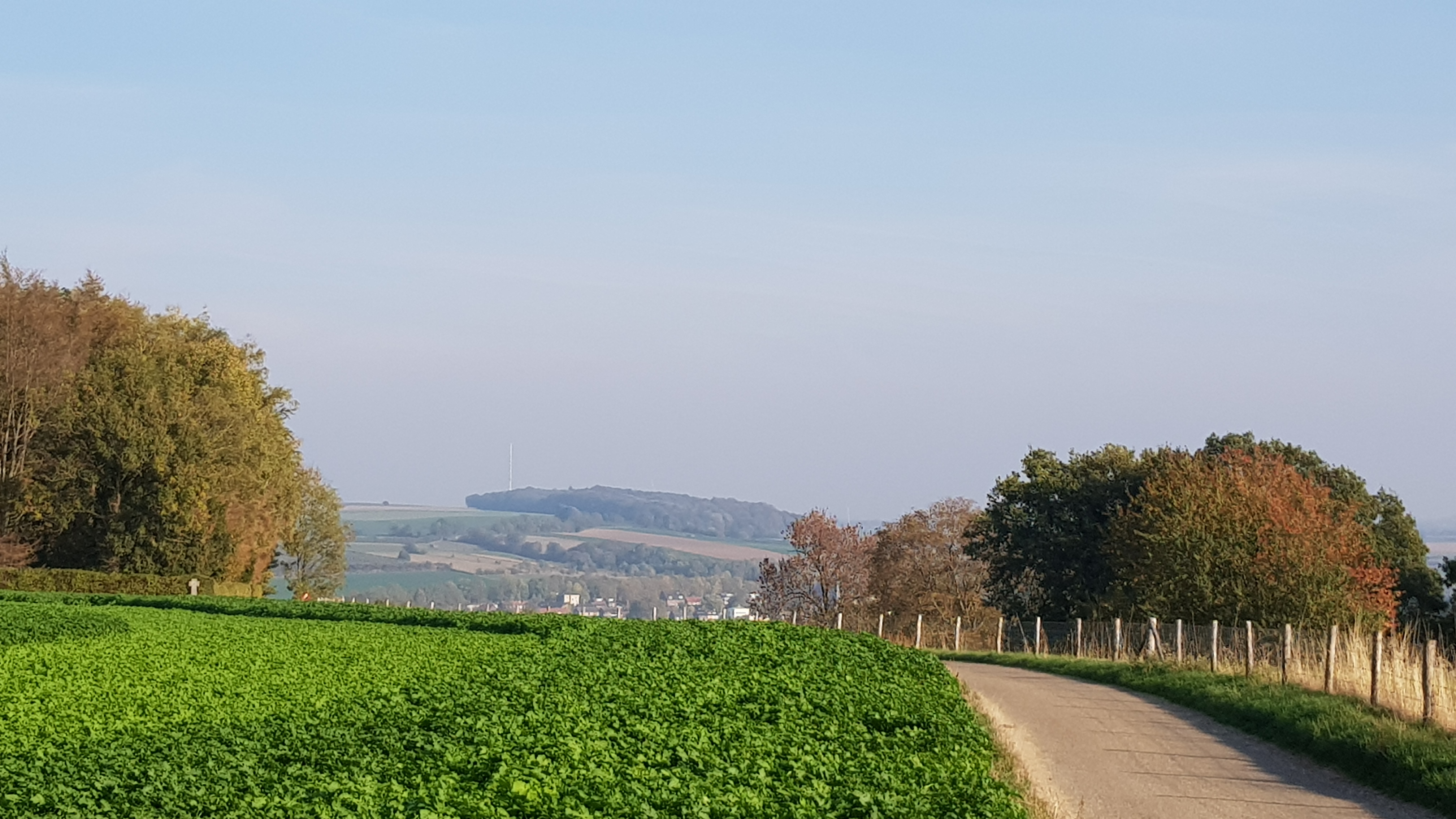 begin Dodemanweg bij Berghof met uitzicht op Eyserbos in de verte, Wijlre, Gulpen-Wittem, Nederland